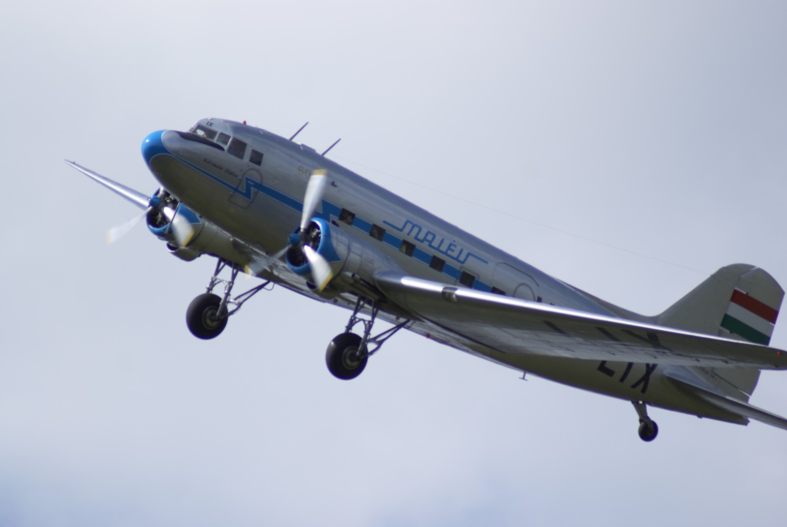 Lissunow Li-2 (HA-LIX) beim 15. Oldtimer-Fliegertreffen auf der Hahnweide